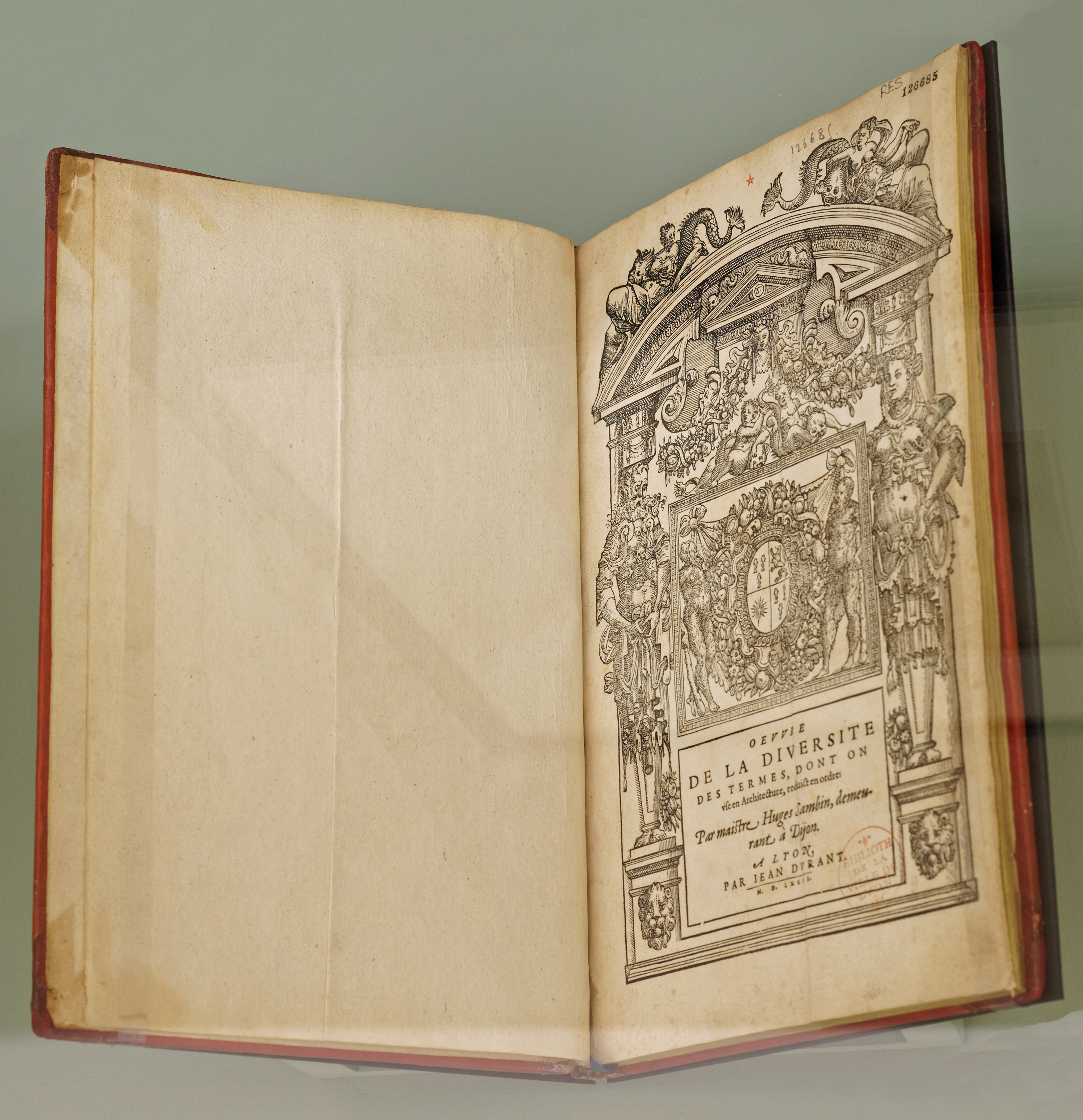 Hugues Sambin (vers 1520 – 1601), Œuvre de la diversité des termes, dont on use en architecture, réduict en ordre, imprimé à Lyon, chez Jean Marcorelle et Jean Durand, 1572 Lyon, Bibliothèque municipale Ouvert au folio 1 ro : Frontispice